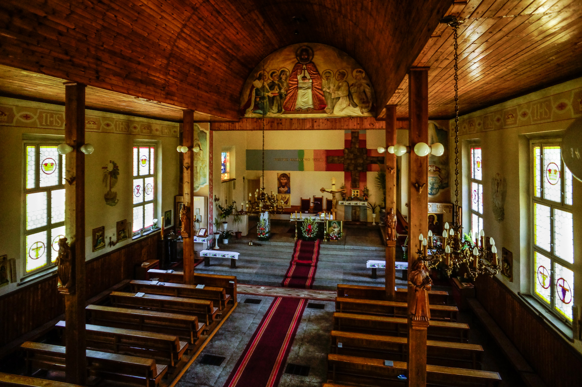 Dłużyna Dolna - kościół p.w. Chrystusa Króla Wszechświata.